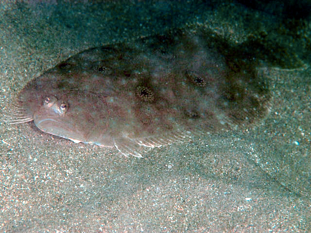 ヘラガンゾウビラメ Pseudorhombus oculocirris